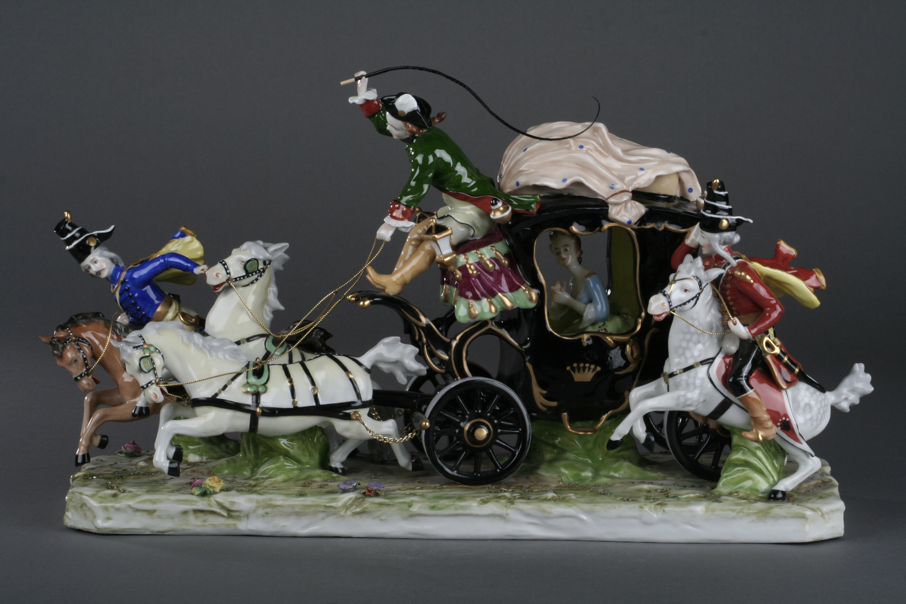 Flucht der Gräfin Cosel